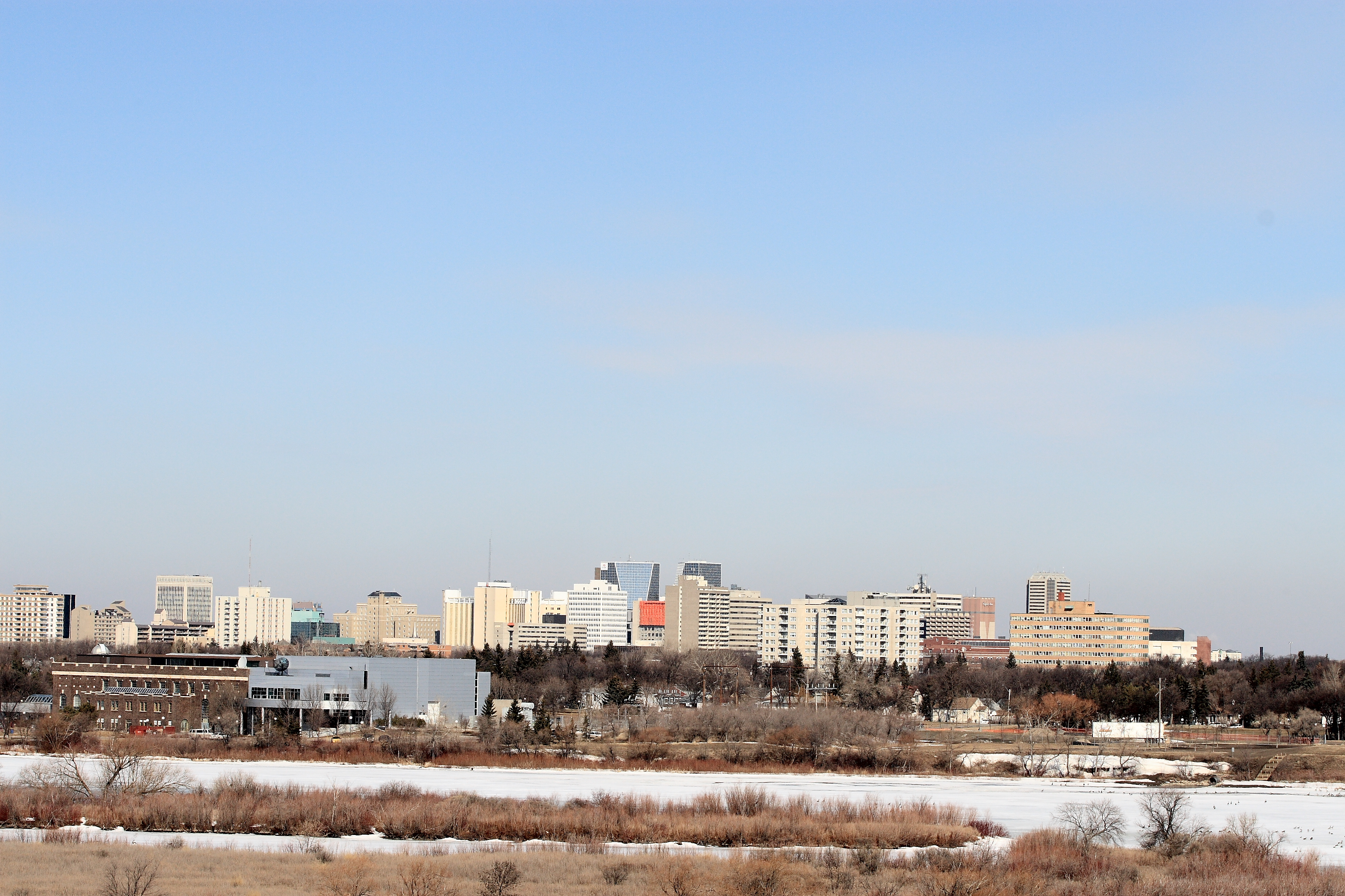 Regina Saskatchewan